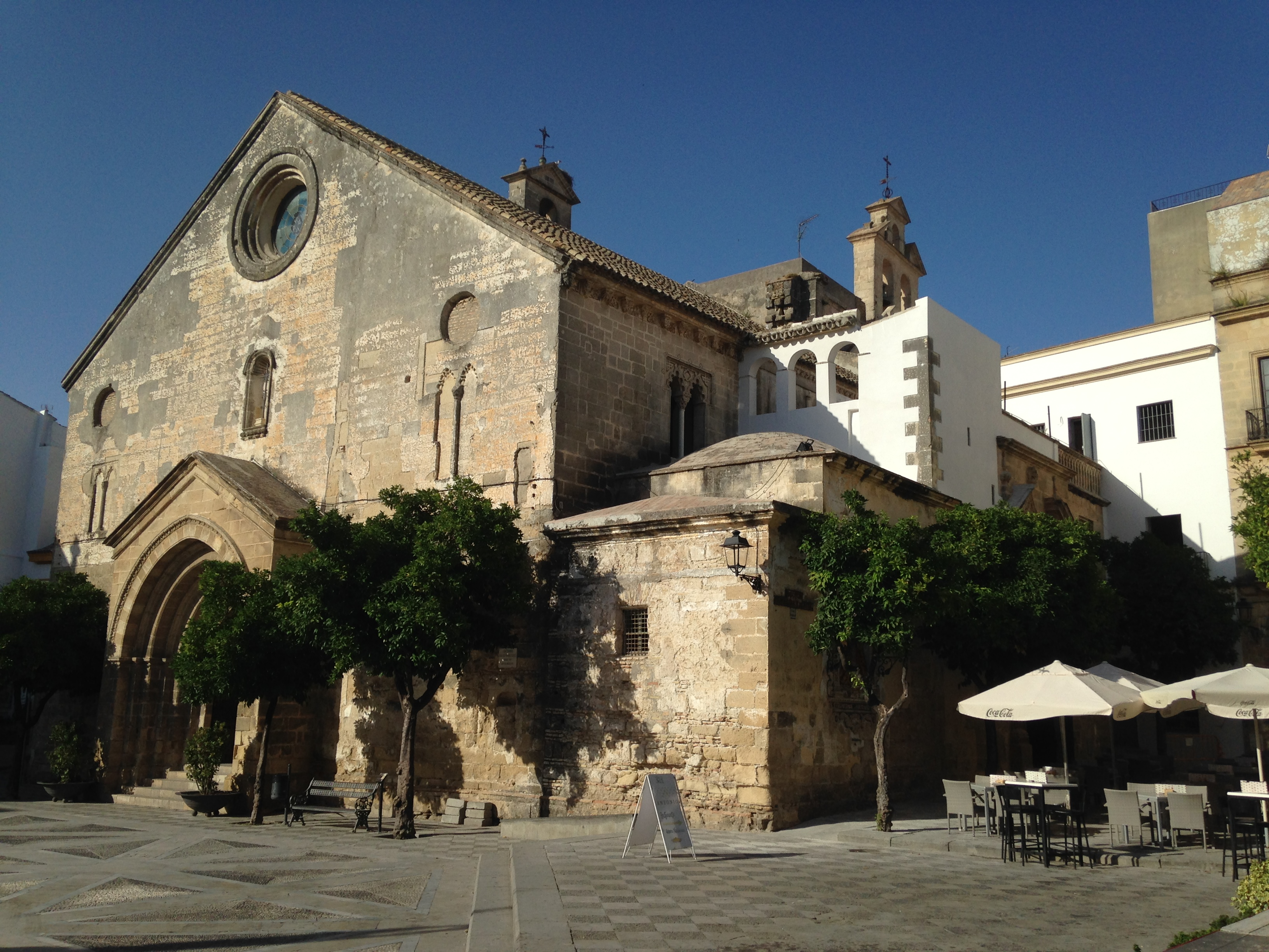 IGLESIA DE SAN DIONISIO 2017